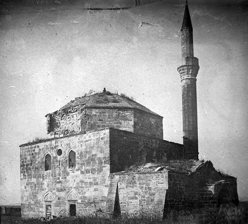 Кулеч-Мечеть -- одна из старейших мечетей Крыма. Построена в период Крымского ханства. Разрушена большевиками.